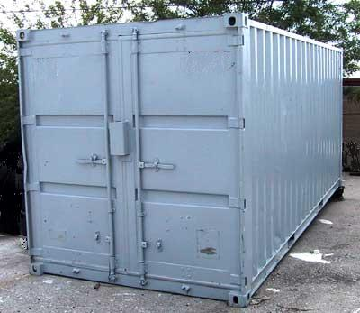 trasporti - container 20 piedi